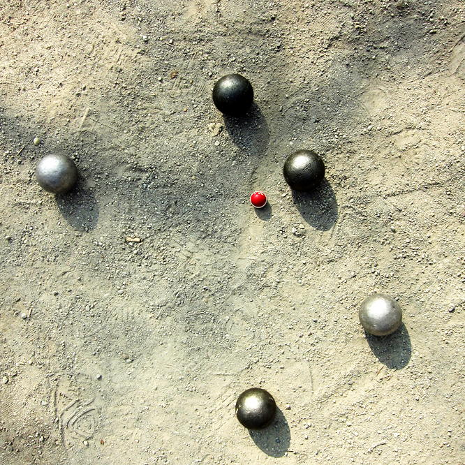 Spielsituation 1 - Team A (dunkle Kugeln) hat aktuell zwei Punkte, da die beste Kugel von Team B (helle Kugeln) erst an dritter Stelle liegt.